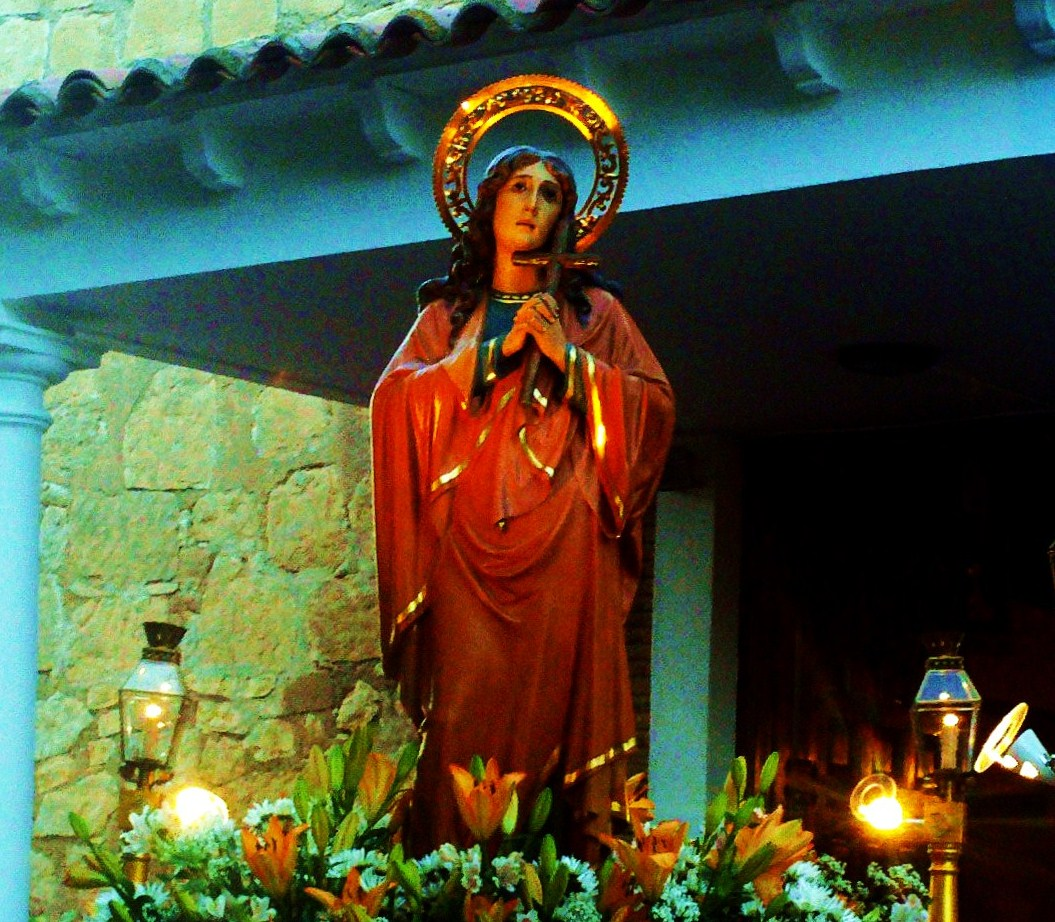 Santa María Magdalena, patrona de Villamuelas